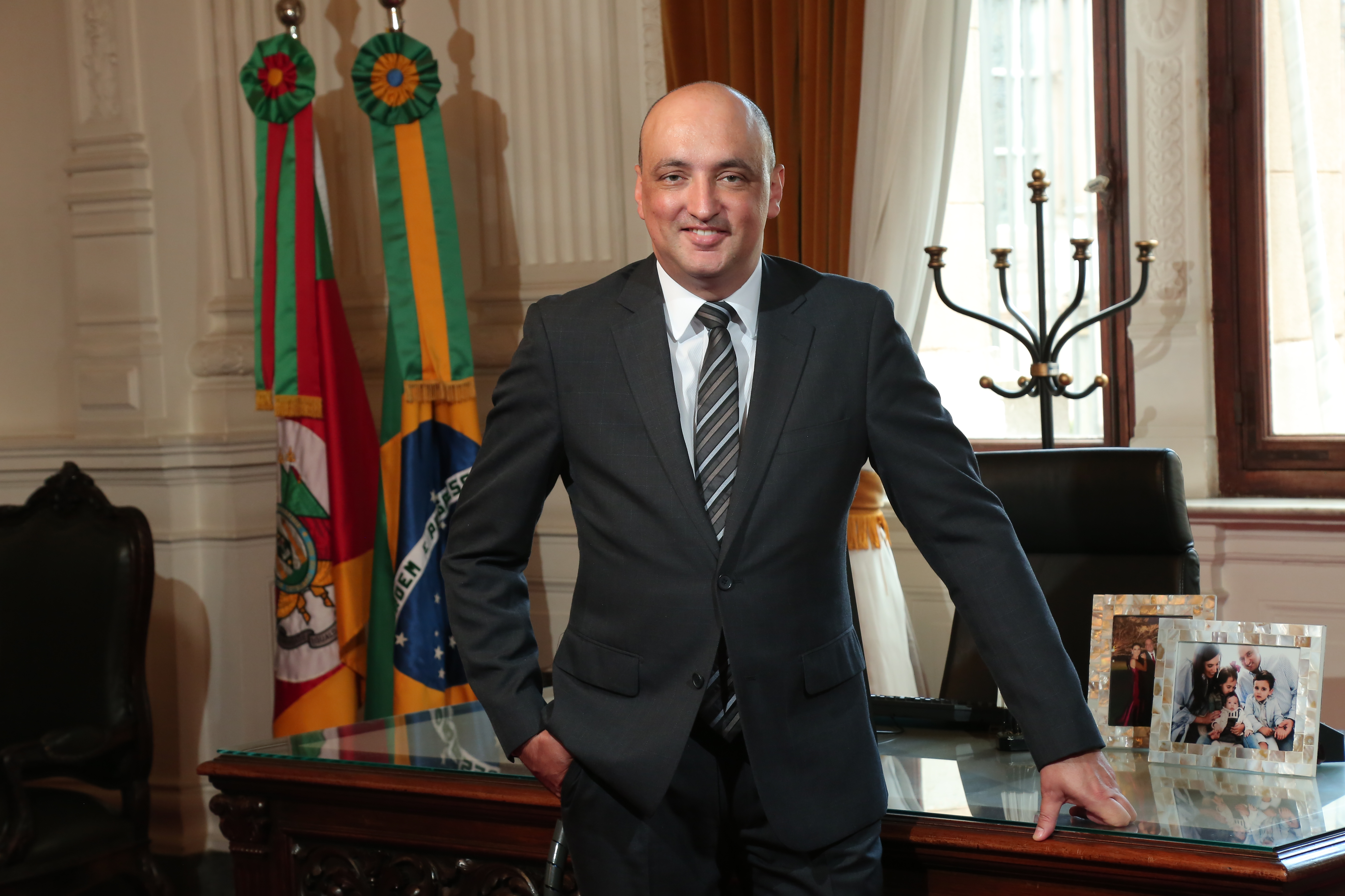 Cleber Benvengú foi chefe da Casa Civil do governo de José Ivo Sartori